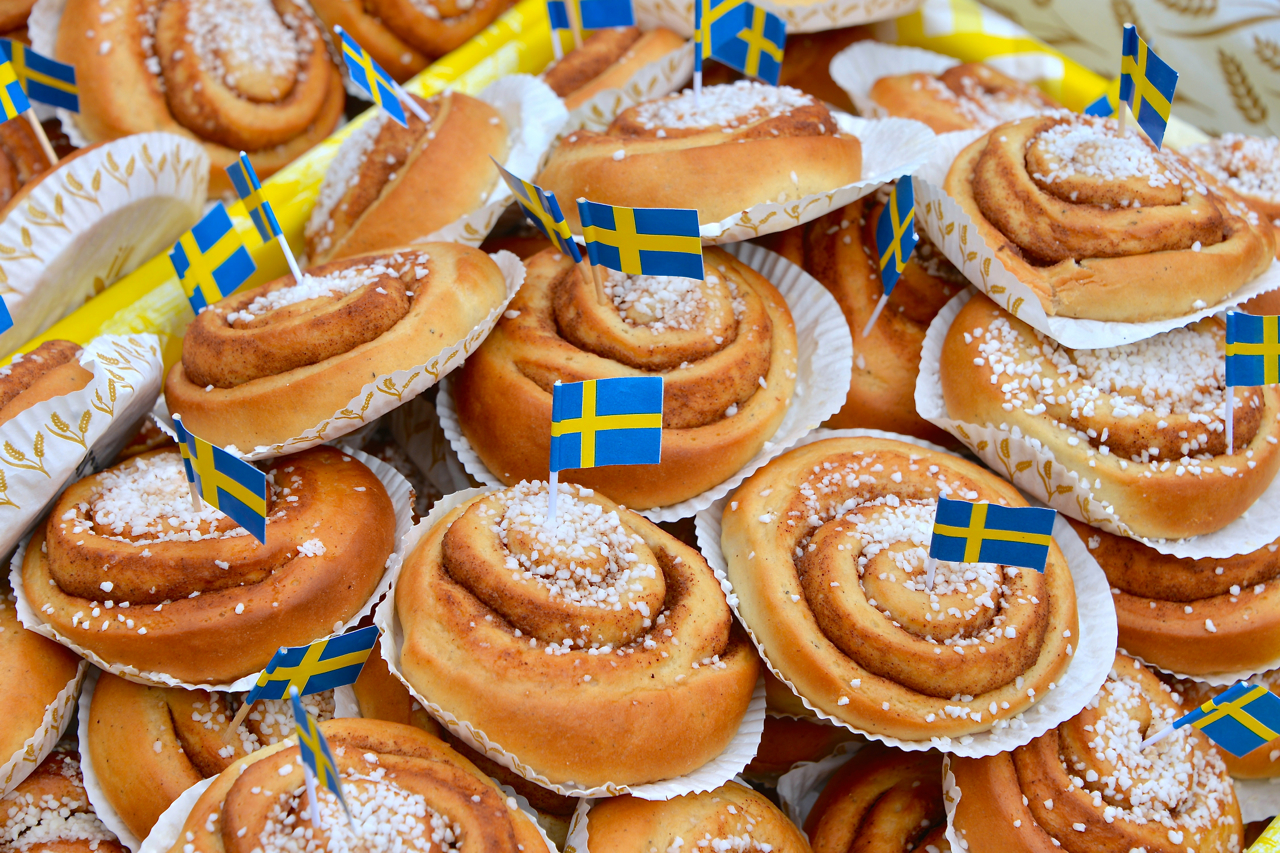 Nationaldagen 2014 i Stockholm.